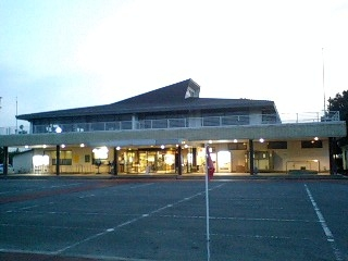 朝霞パブリックゴルフクラブ・クラブハウス（埼玉県朝霞市上内間木）